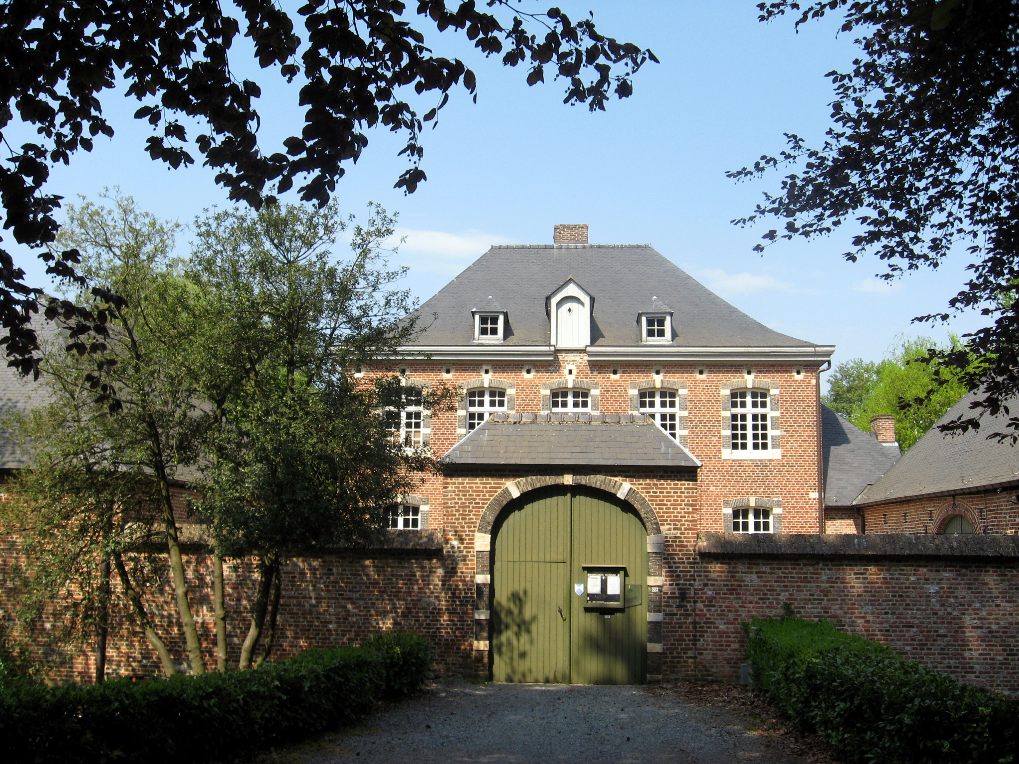 Voormalige witherenpastorie, Heemkundig museum Woutershof in Zolder